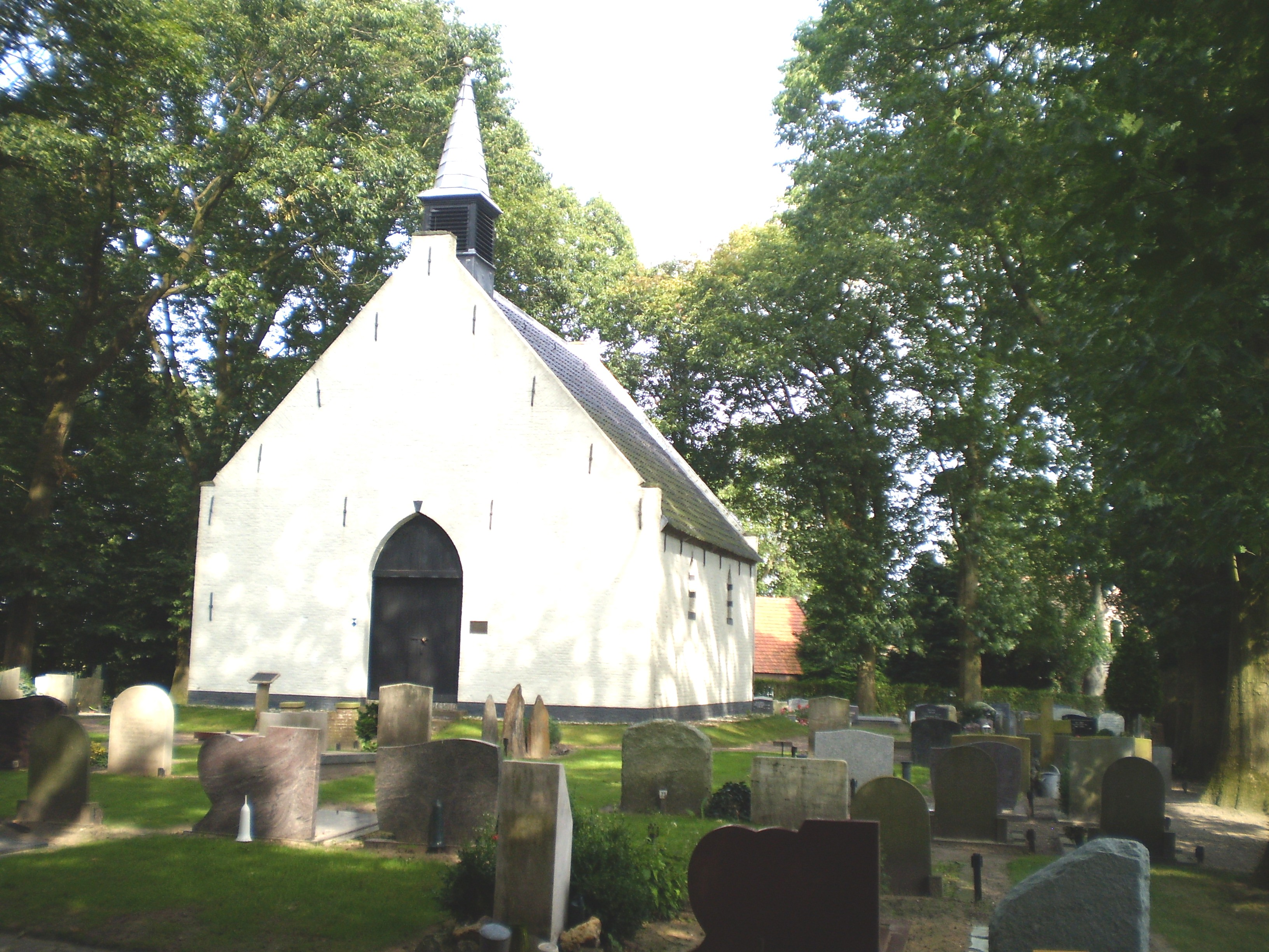 Coelhorster Kapel